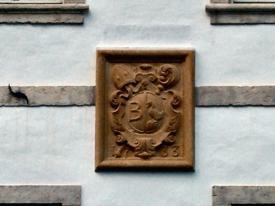 Détail des armoiries (bâtiment principal de l'abbaye - 1733)